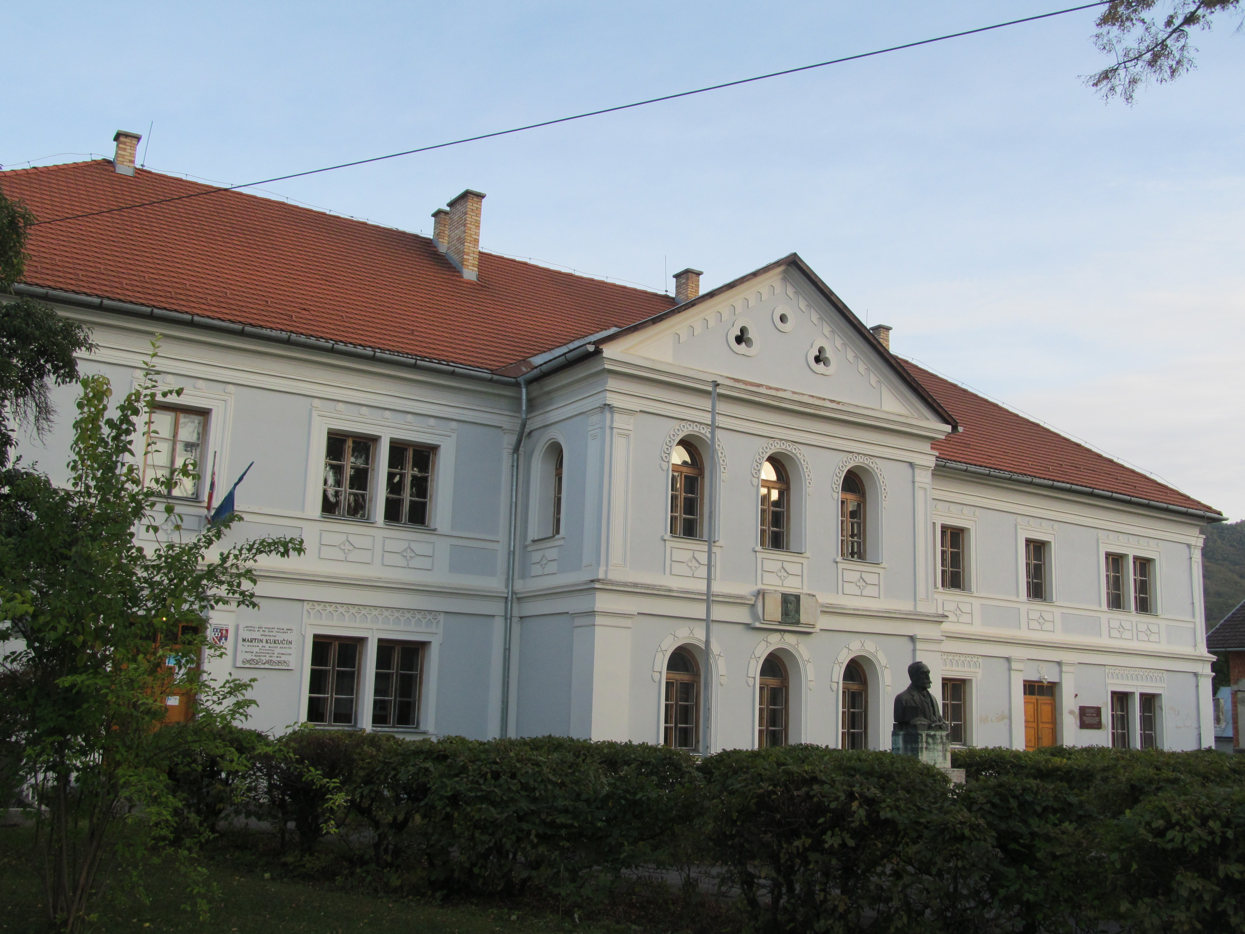 Gymnázium pamätné